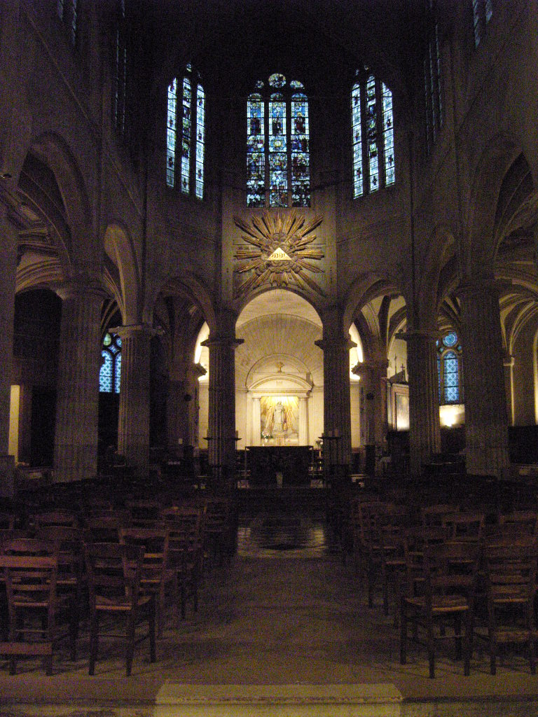 Paris 5e, église Saint-Médard, vue générale de l'intérieur